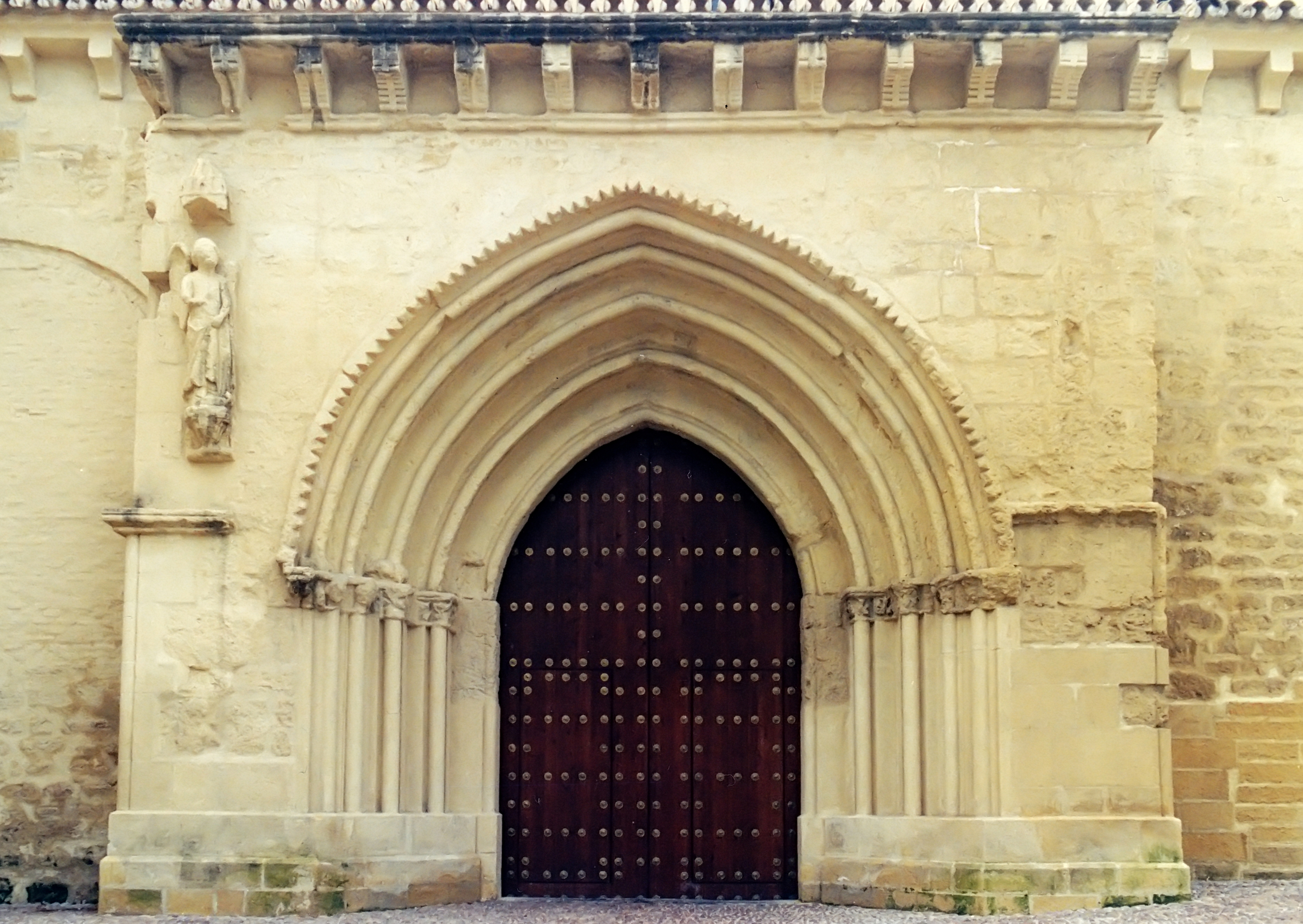 Espagne - Andalousie - Cordoue - Église de la Magdalena